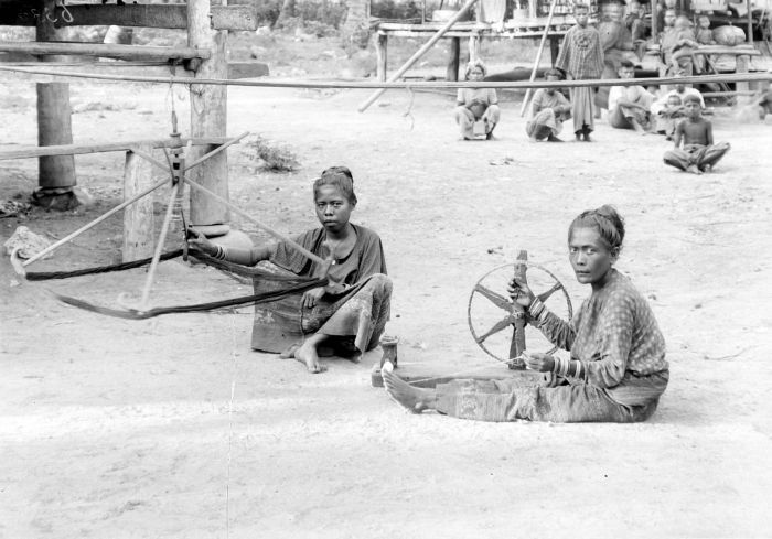 Negatief. Vrouwen van Sika, één met spinnewiel, één met garenwinder, Oost-Flores